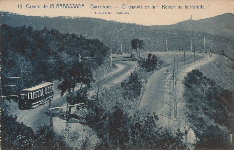 Postal de la carretera de la Rabassada, a l'alçada del Revolt de la Paella, el 1912, on s'hi observa el tramvia de la Rabassada pujant cap al Casino de la Rabassada.